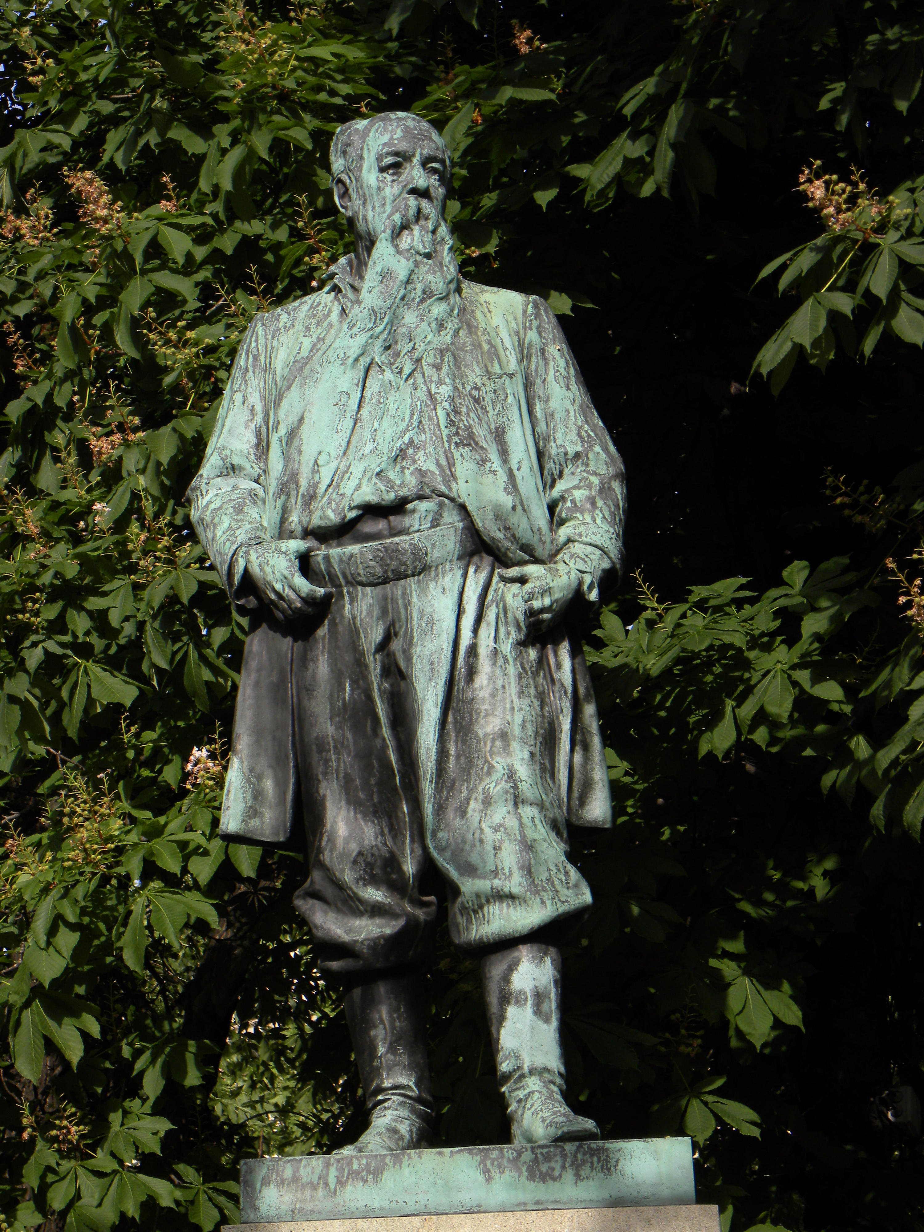 Canon-Denkmal im Stadtpark